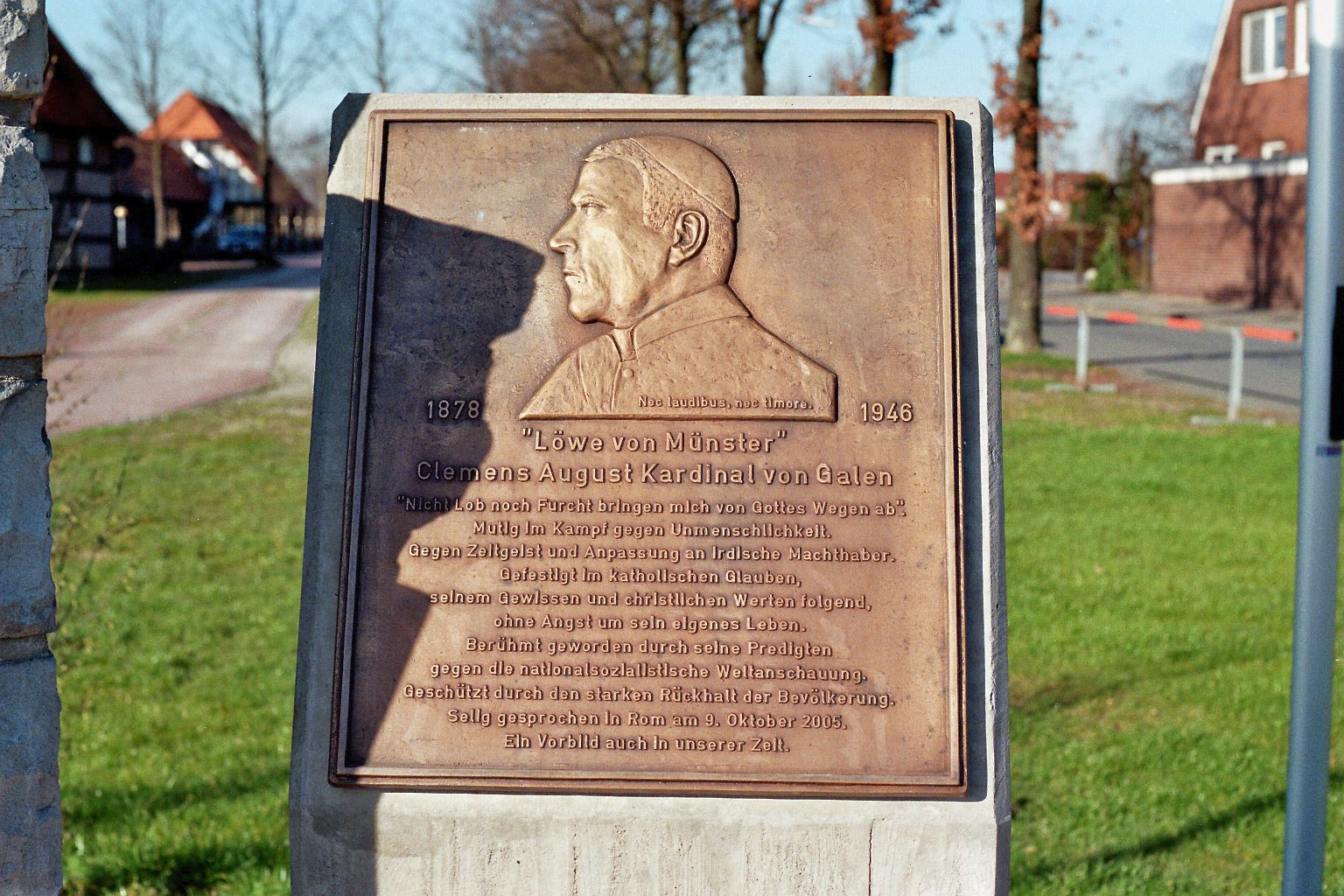 Denkmal für Clemens August von Galen, aufgenommen bei Lippborg